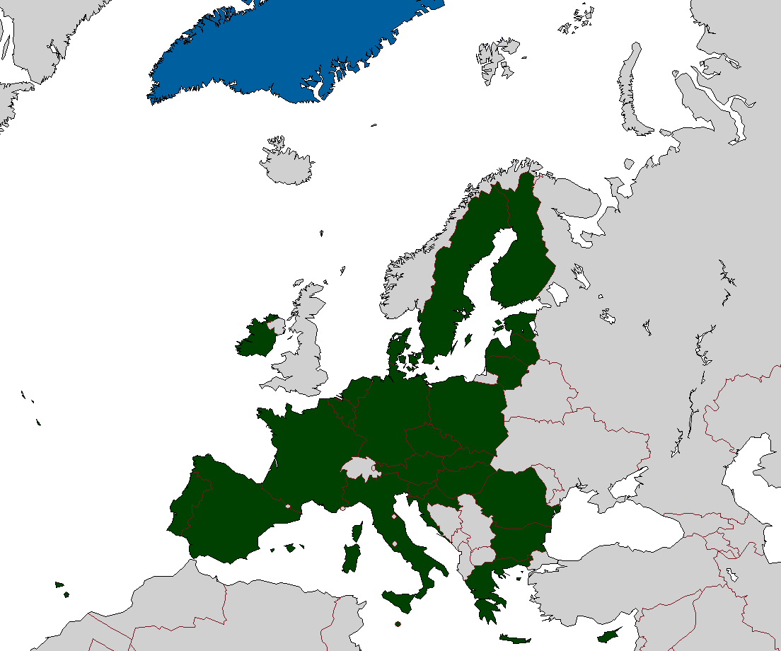 Wielka Brytania opuściła struktury Unii Europejskiej, wobec czego mapa została przeze mnie zaktualizowana.